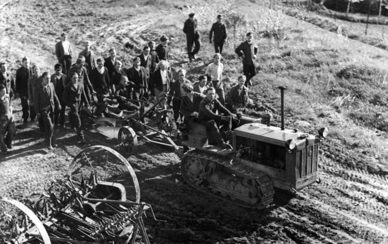 Wickendorf, Traktorfahrer-Lehrgang, Fahrübung Illus/Dumm M.A.S-Landesschule Wickendorf/Mecklenburg UBz.: Der Lehrgang beim Unterricht am fahrenden Raupenschlepper im Gelände. 18.5.49 3271-49 [Landessschule der Maschinen-Ausleihstationen]